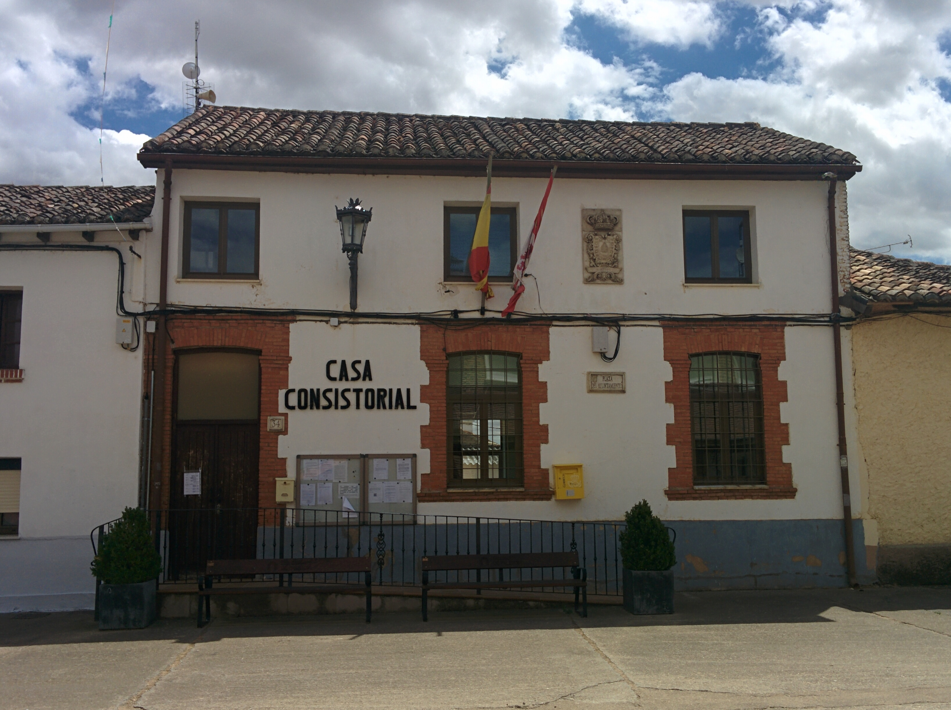 Casa consistorial de Calahorra de Boedo (Palencia, España).